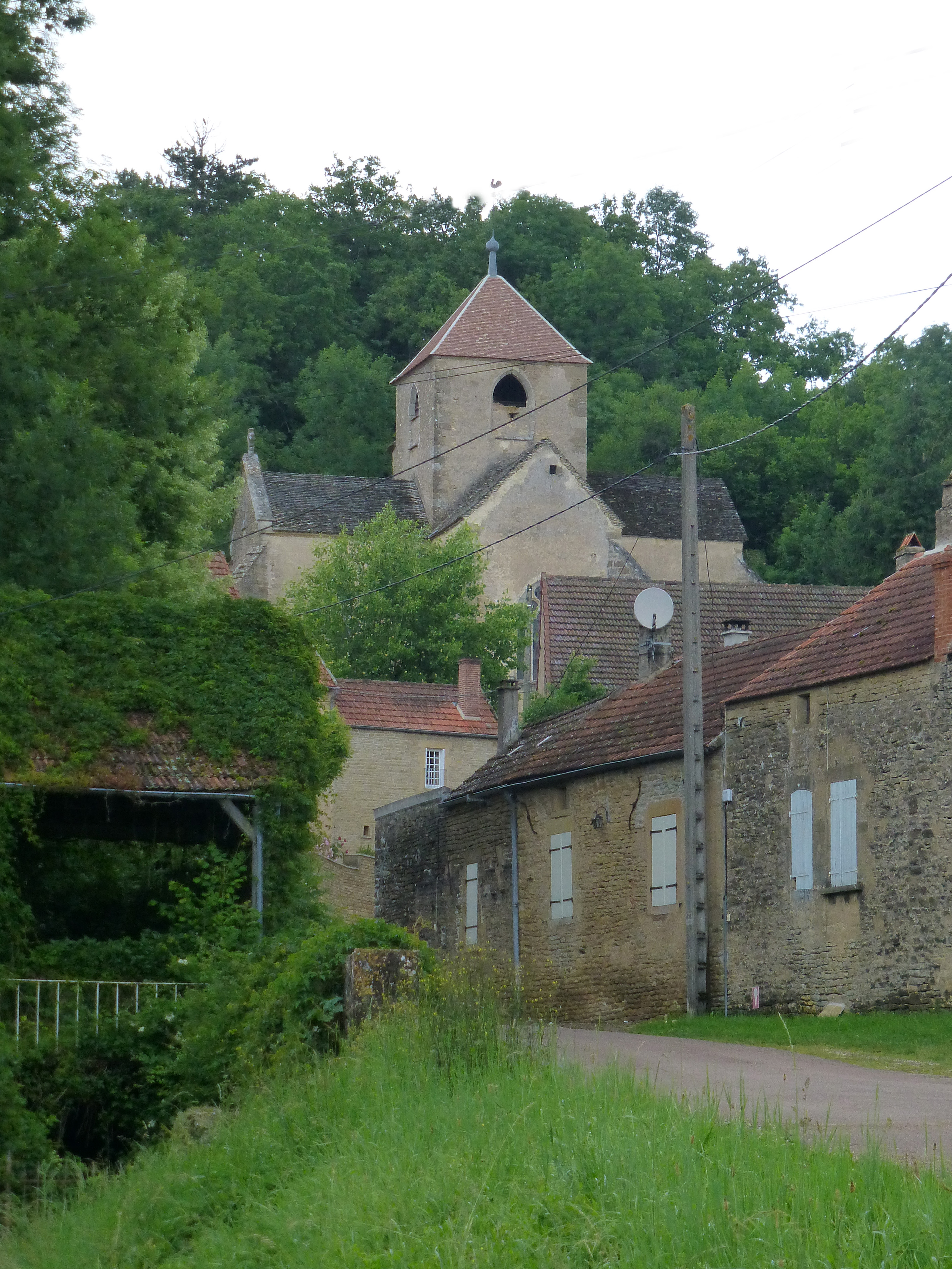 Église Saint-Pierre de Talcy (Yonne)